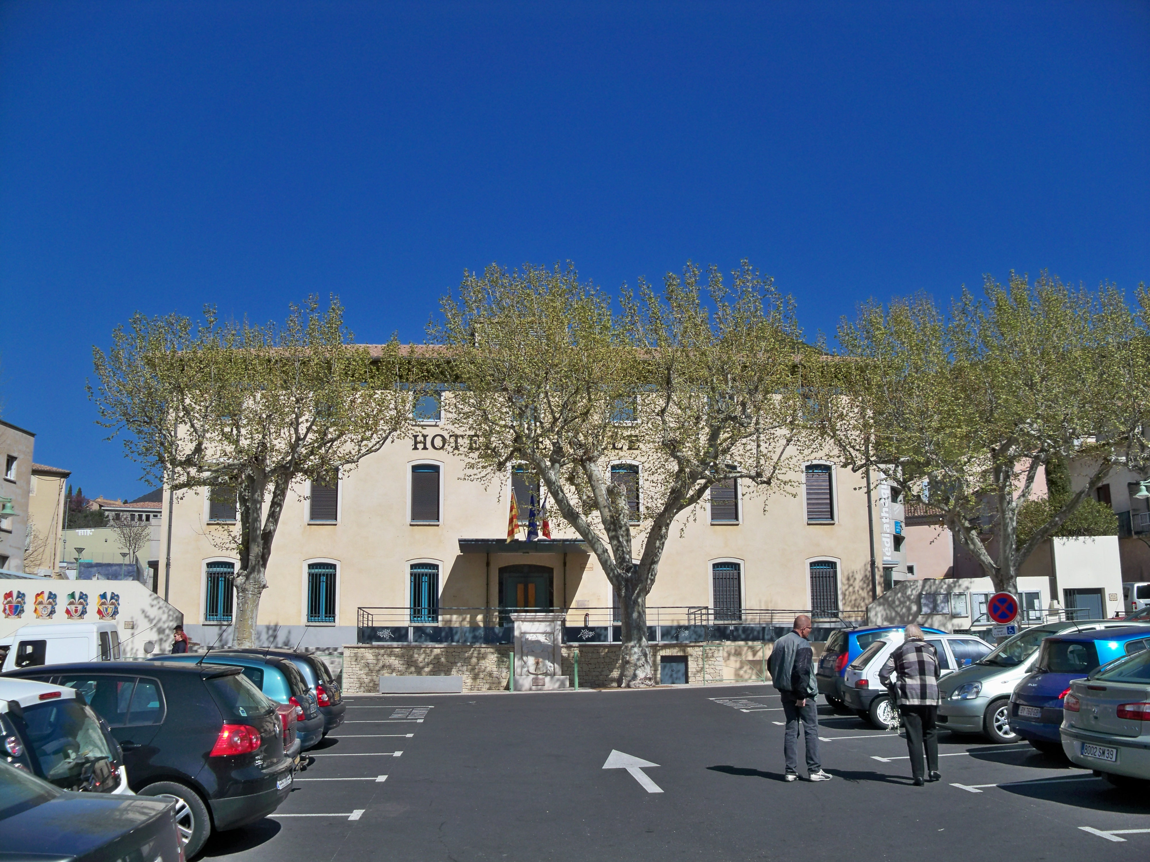 Hôtel de ville de Nyons (26)